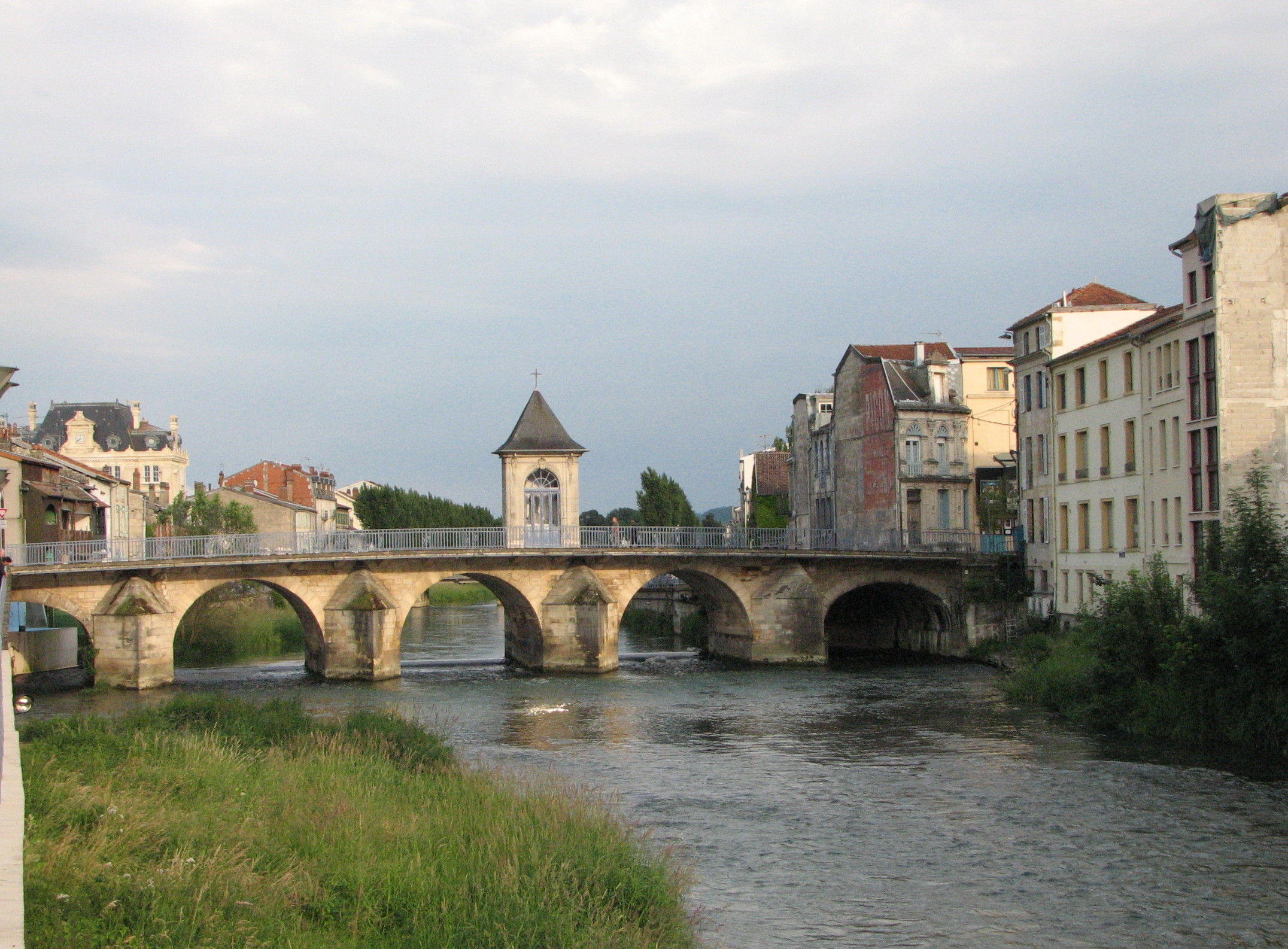 Pont Notre-Dame à Bar-le-Duc